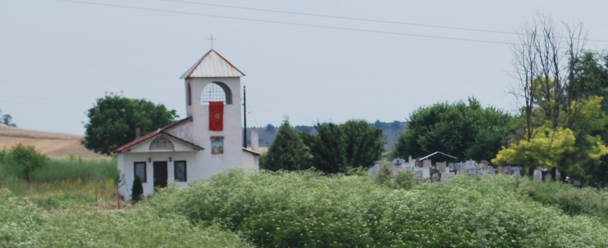 St. Nicholas Church (Krupište)